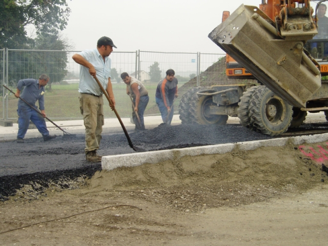 Asphaltbauer